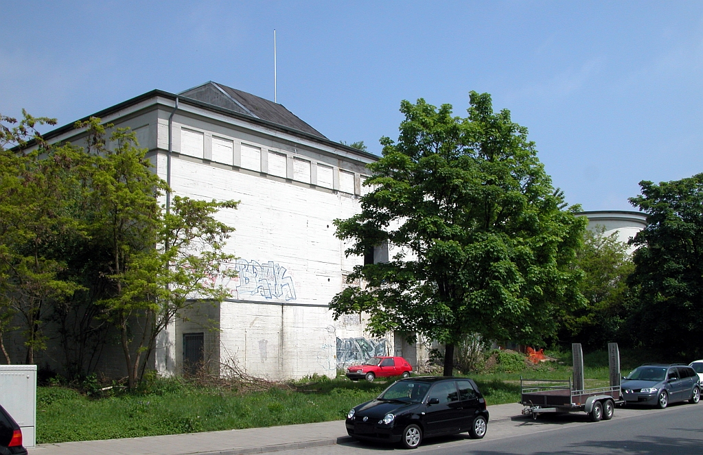 Braunschweig, Madamenweg 130, Braunschweigs größter Luftschutzbunker. Erbaut 1941/42 für 1.500 Personen.